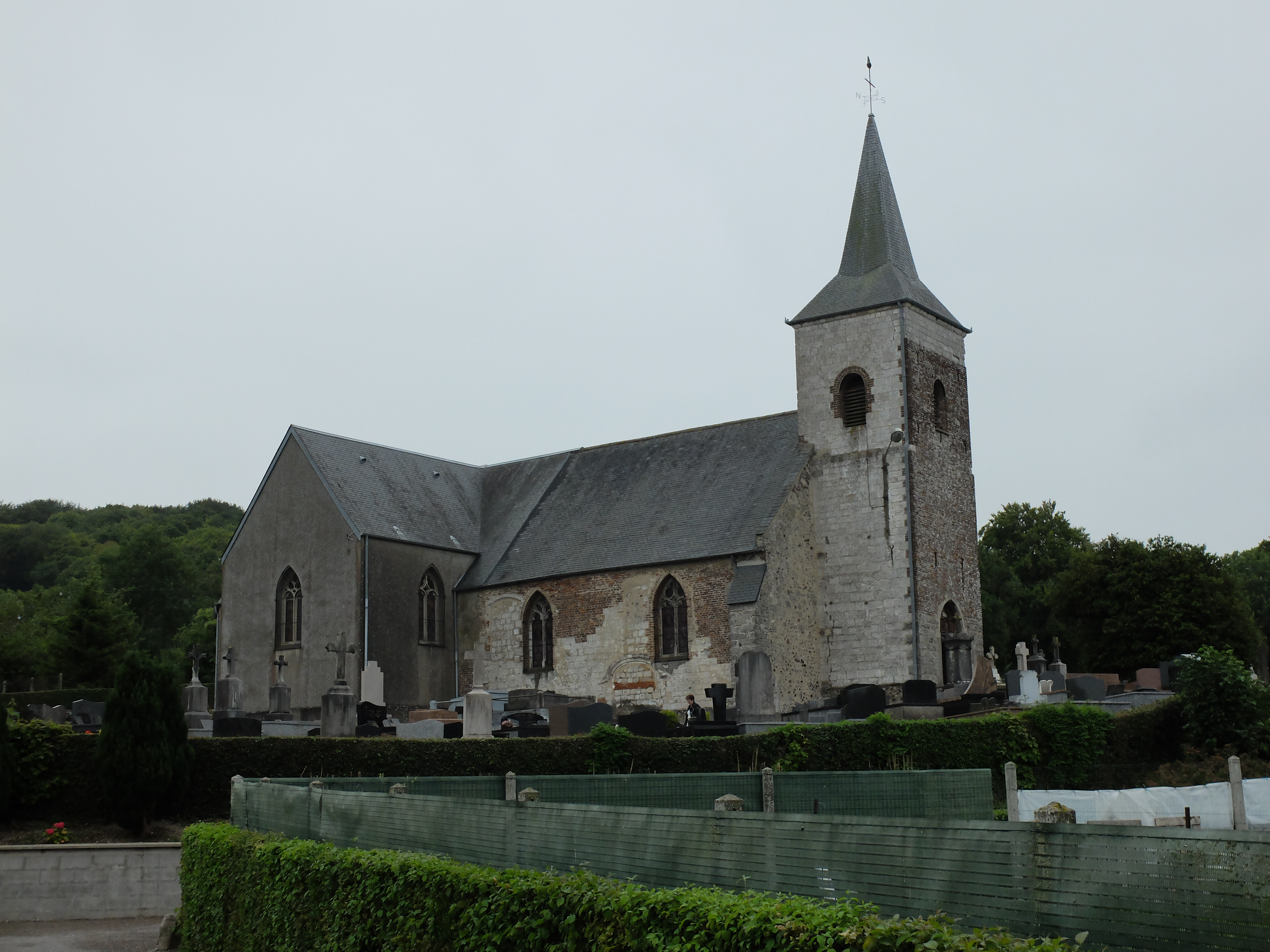 Vue de l'église Sainte-Bertulphe de Doudeauville (Pas-de-Calais).